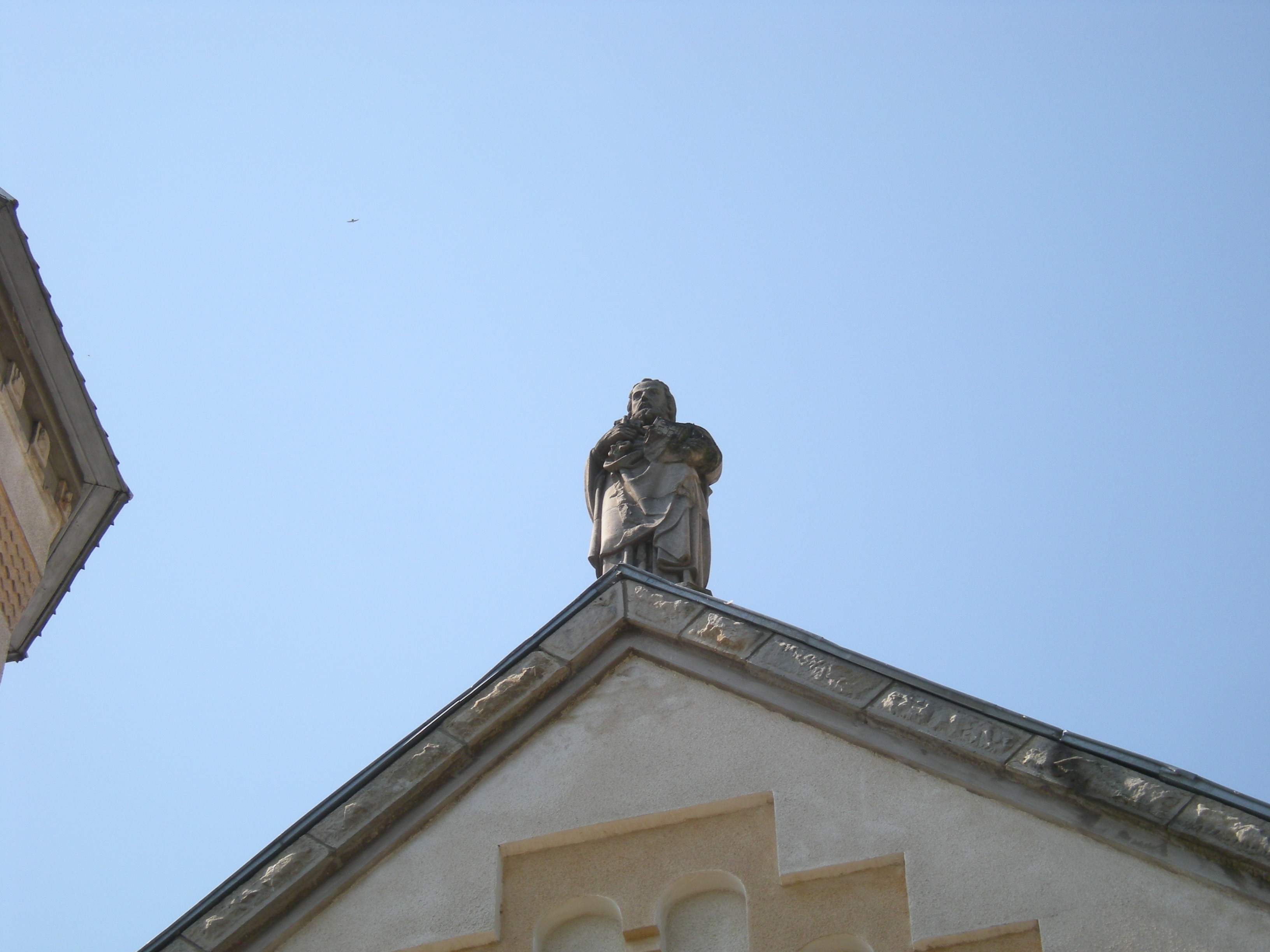 Biserica cu hramul „Sfinții Petru și Paul” din Onești, construită între 1920-1945, element de arhitectură.